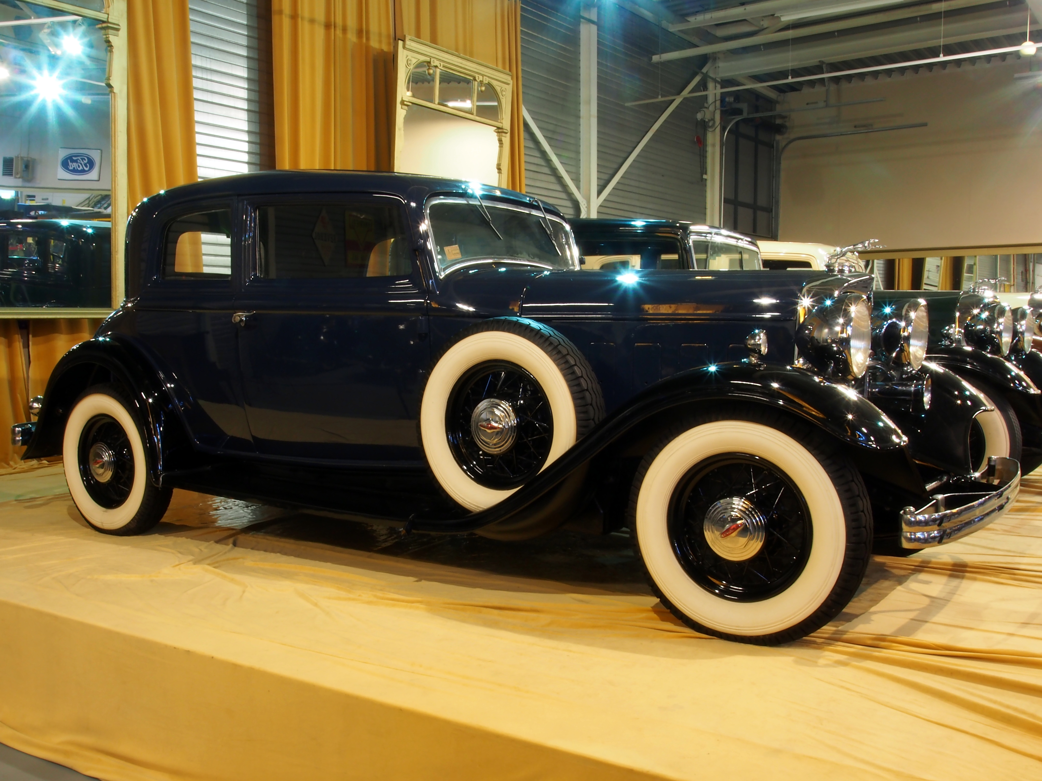 Den Hartogh Ford Museum; 1932 Lincoln Model KA (series 501) Victoria Model 506